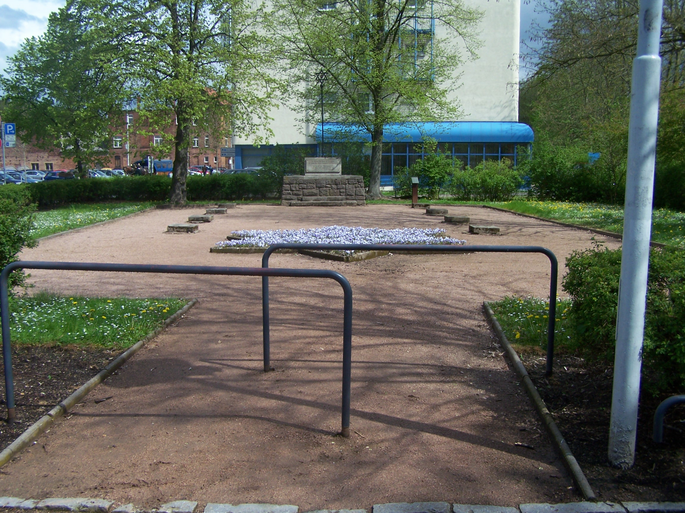 Das am Standort der 1938 zerstörten Synagoge in Eisenach errichtete Mahnmal in der Karl-Marx-Straße.